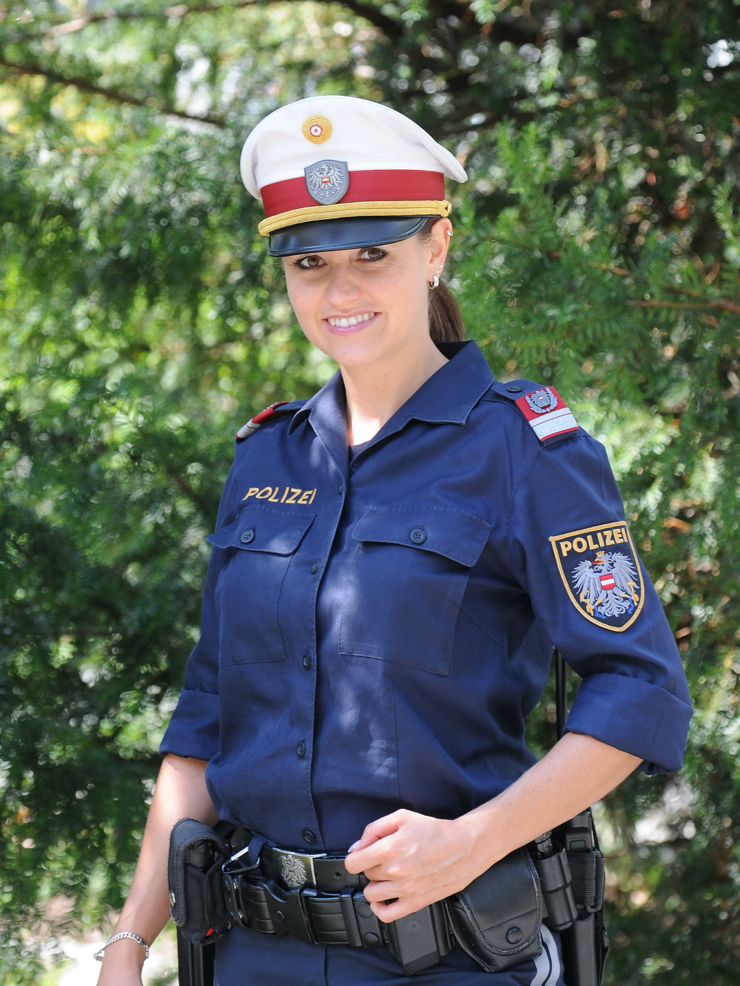 Eine Beamtin der österreichischen Bundespolizei mit Uniformhemd und Tellerkappe weiß.